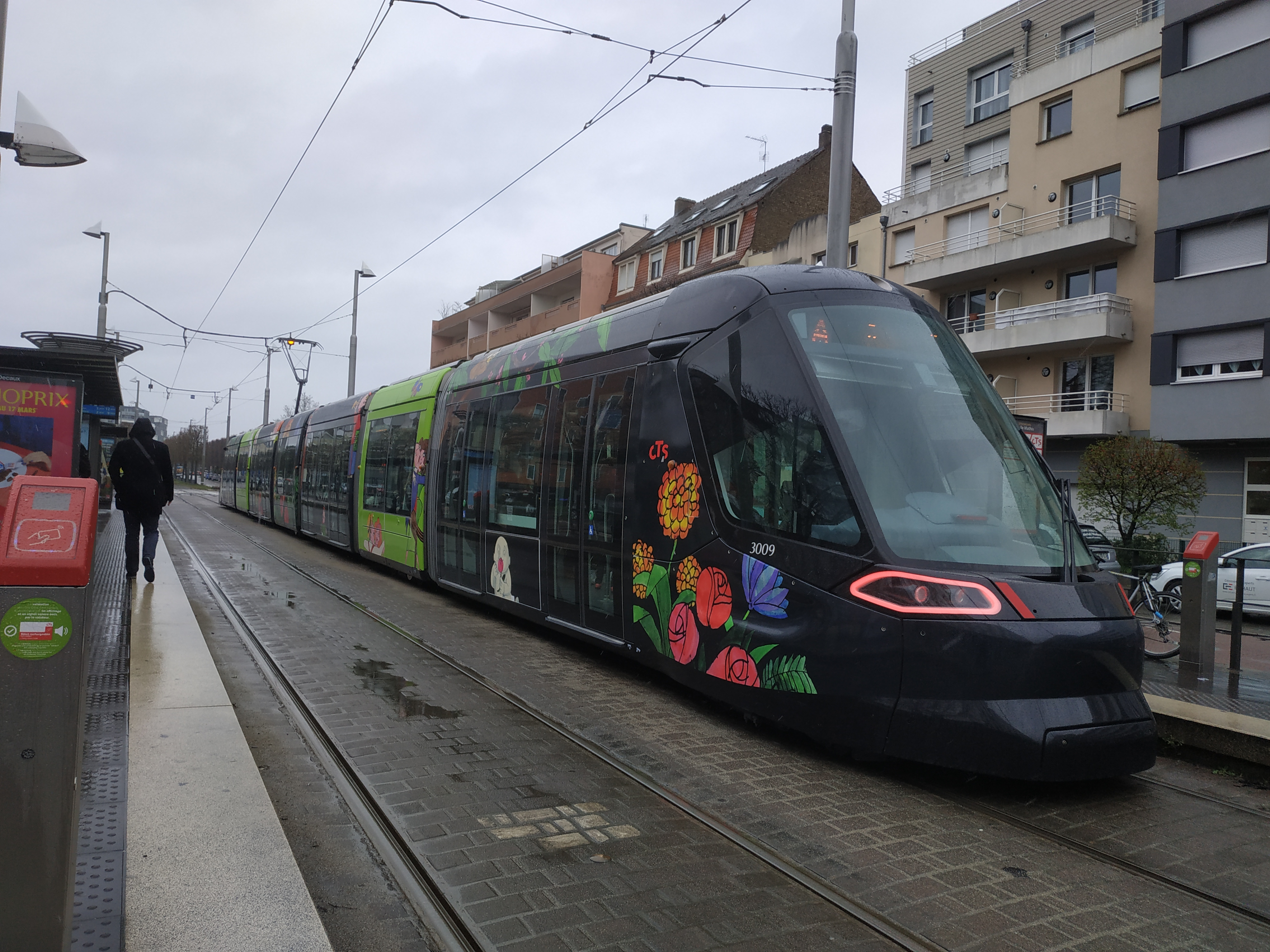 Tramway recouvert aux couleurs de "Tomi Ungerer" à Strasbourg. Deux rames ont été recouvertes d'une livrée dédiée à l'artiste, les deux étant différentes. Il s'agit ici de la première livrée appliquée, le tout sur un Citadis 403.